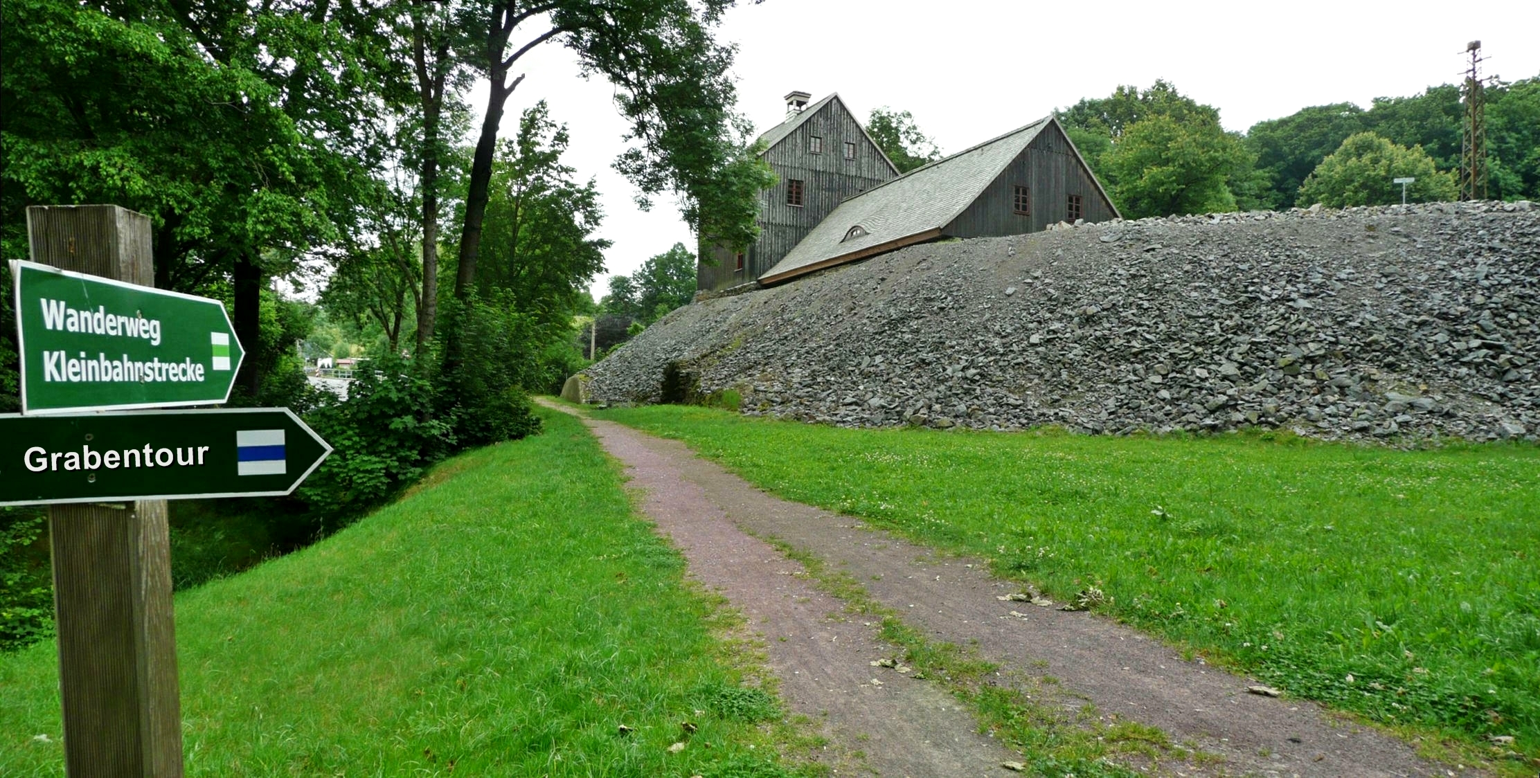 Das Bild zeigt die Trasse der 1972 stillgelegten Schmalspurbahn Freital-Potschappel–Nossen in Reinsberg. Im Hintergrund ist die Halde, das Treibehaus und die Radstubenkaue vom IV. Lichtloch des Rothschönberger Stollns zu sehen.